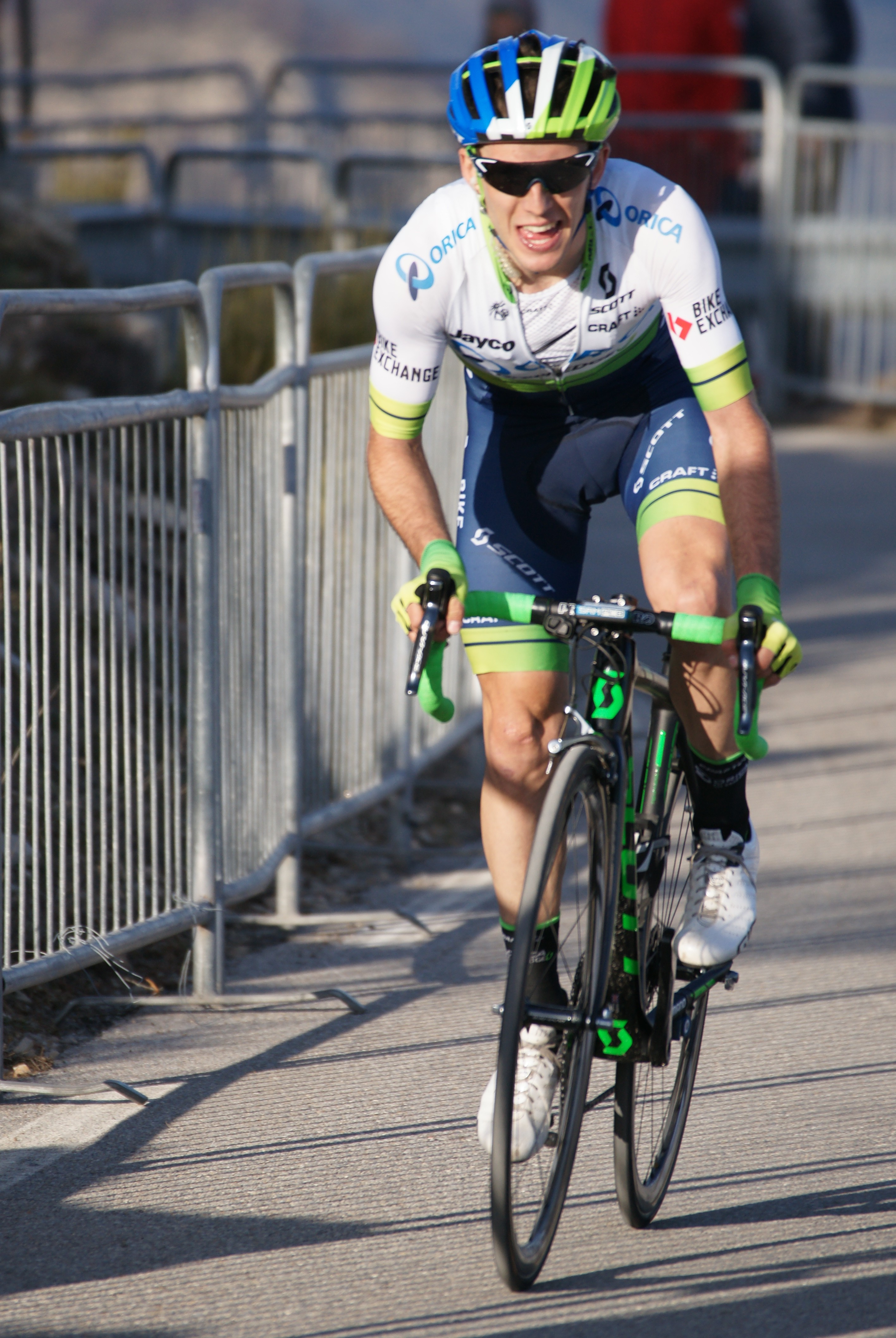 Simon Yates Madone d'Utelle 2016 Depicted person: Simon Yates Depicted team: Orica-GreenEDGE